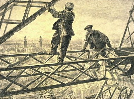 Deux ouvriers de la Tour Eiffel par Paul Renouard lors de l'Exposition Universelle de 1900